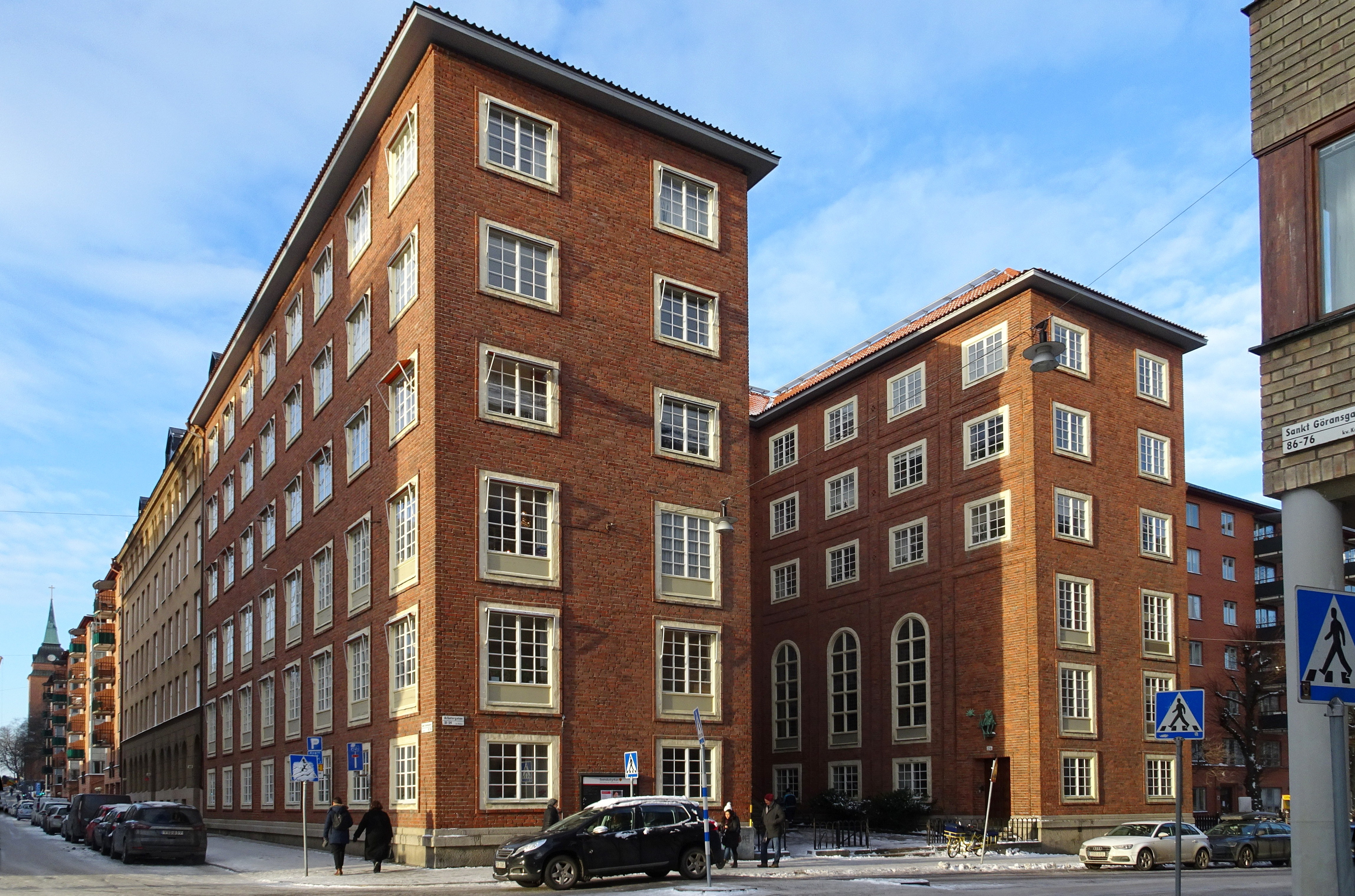 S:t Görans församlingshus, fastighet Herden 7, arkitekt Cyrillus Johansson